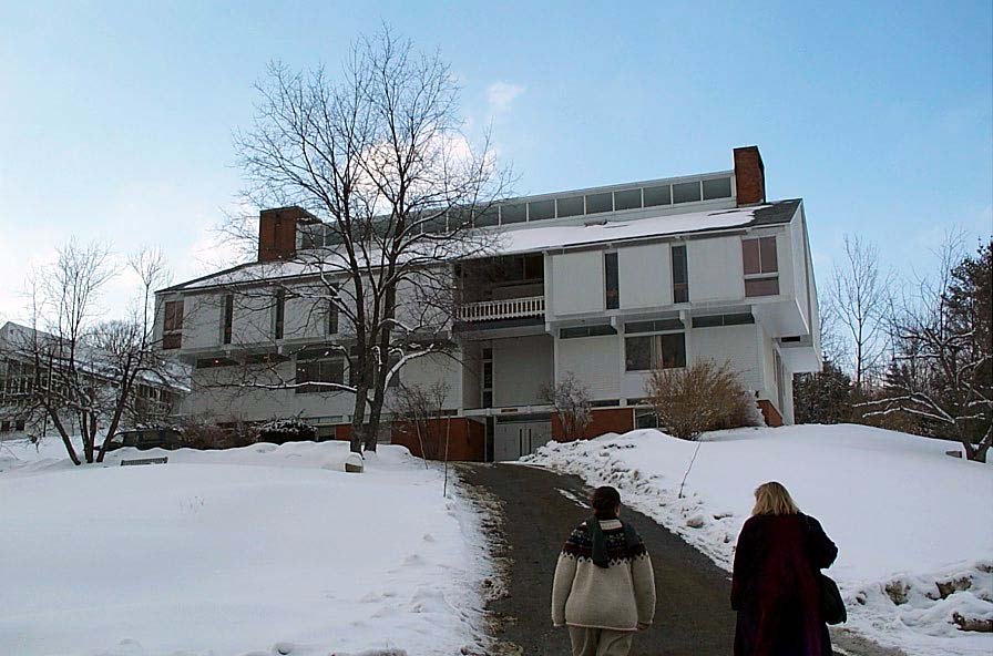 Marlboro library